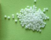 dose globules de 1 gramme